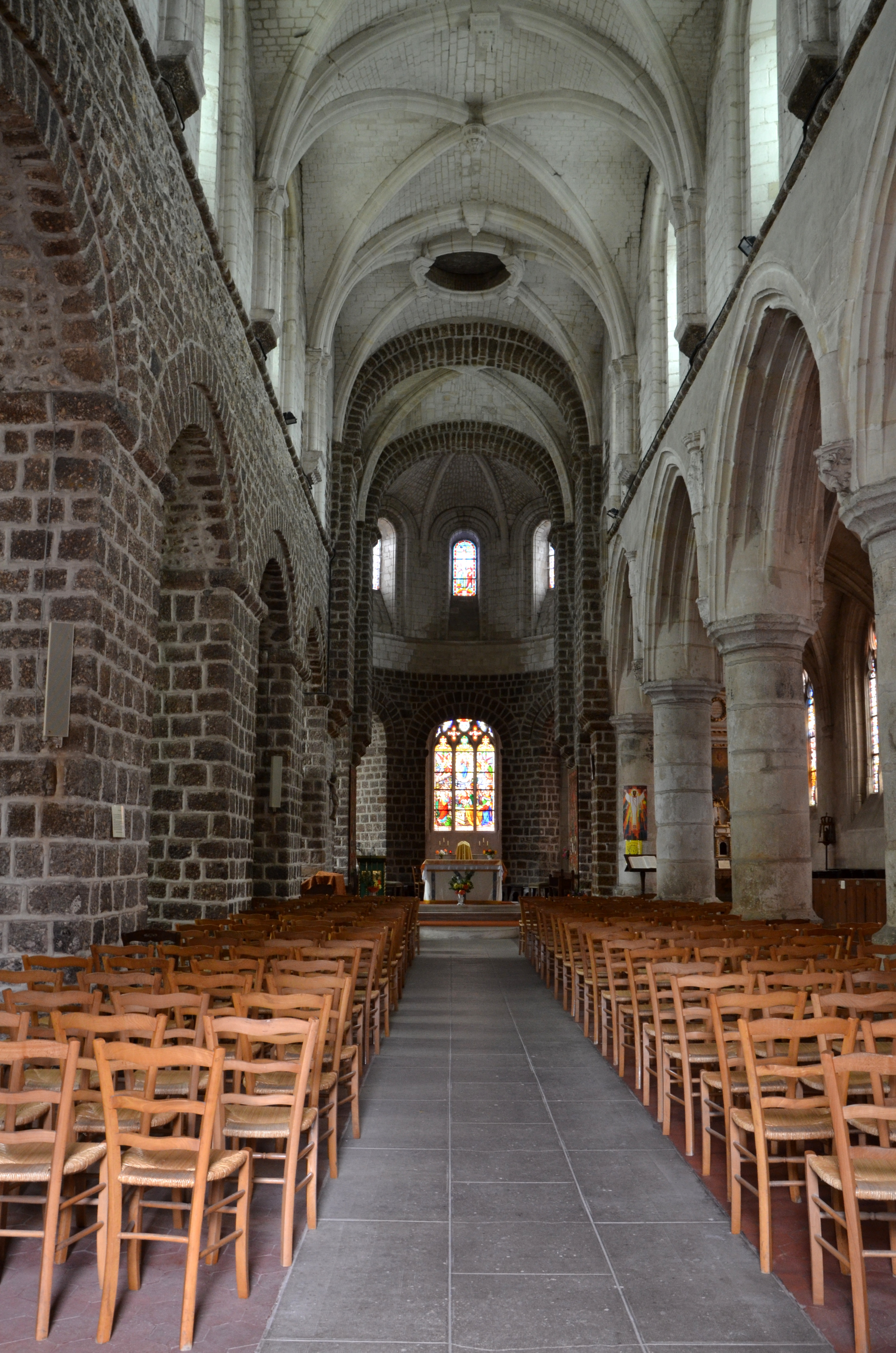 Intérieur de l'église de Broglie, Eure, France .